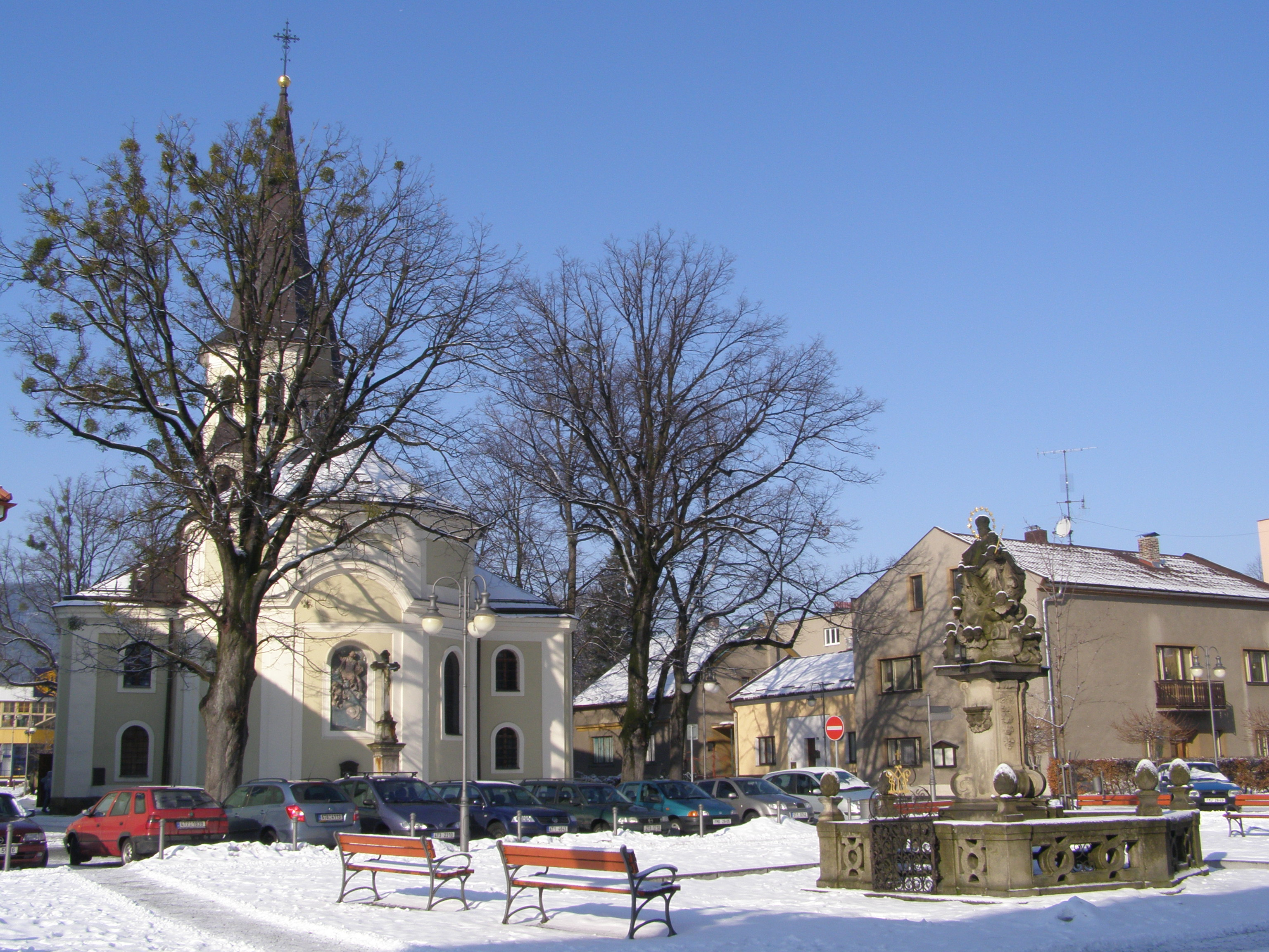 Frýdlant nad Ostravicí, Náměstí, vlevo kostel svatého Bartoloměje, vpravo socha Panny Marie Karmelské